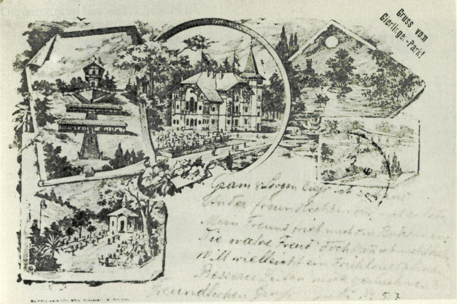 Der Gierlinger Park war ein Vergnügungsbetrieb in München-Thalkirchen zwischen 1900 und 1904. Er bot neben einem Restaurant mit Wirtsgarten und Café auch eine Almhütte, einen See mit Bootsverleih und mehrere weitere Attraktionen.